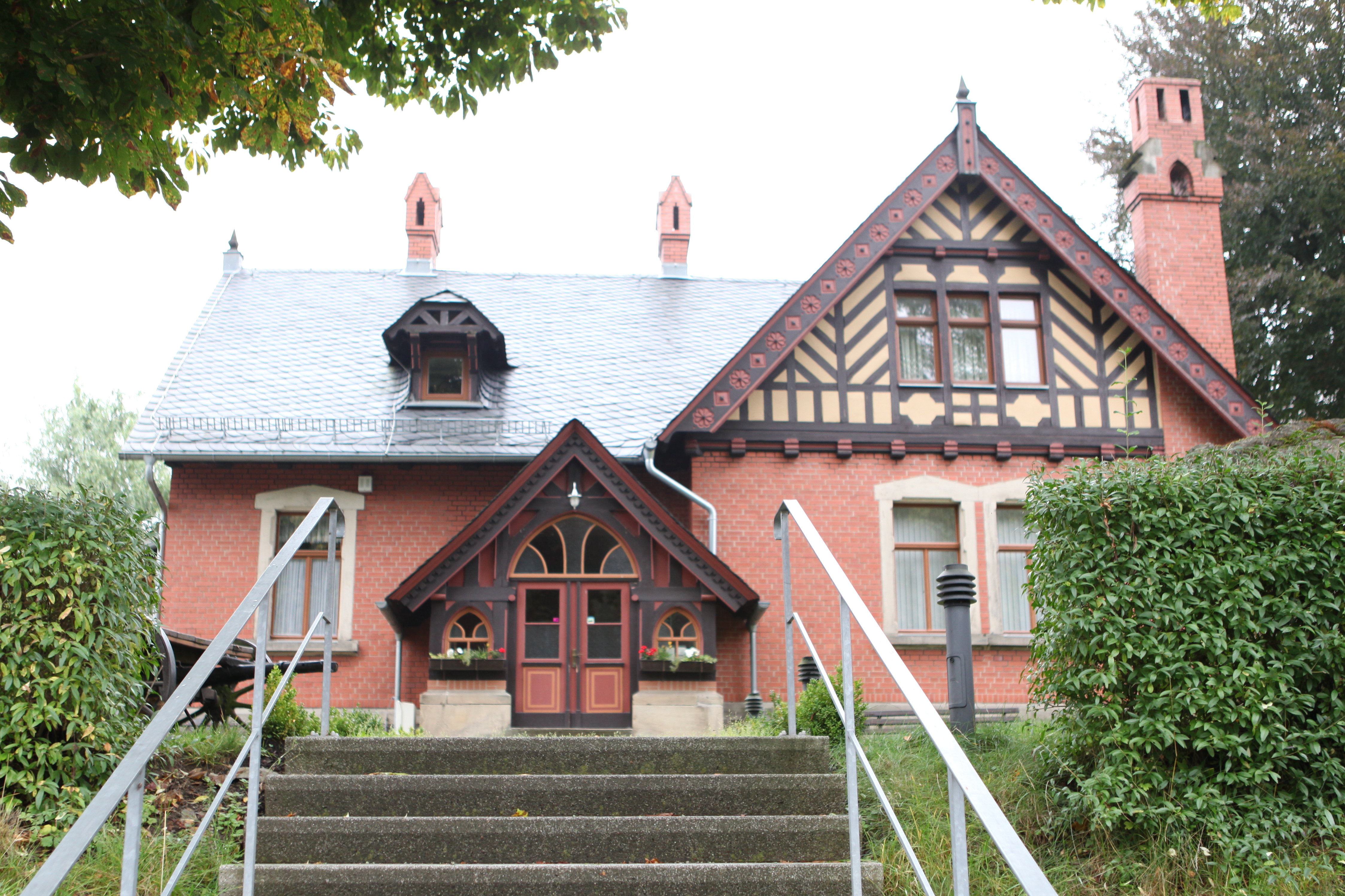 Georgstift , Gräfenthal